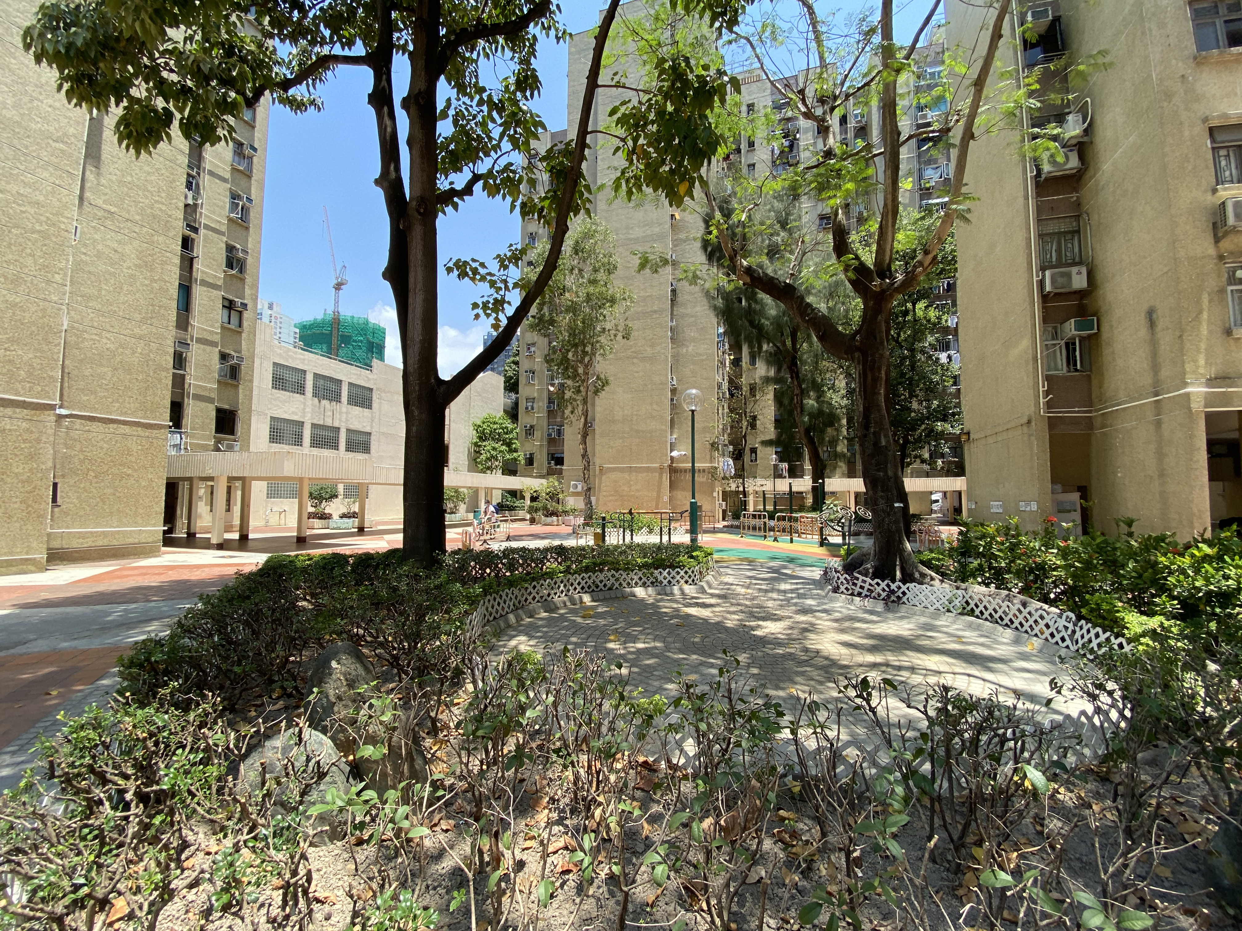 Yee Kok Court Garden